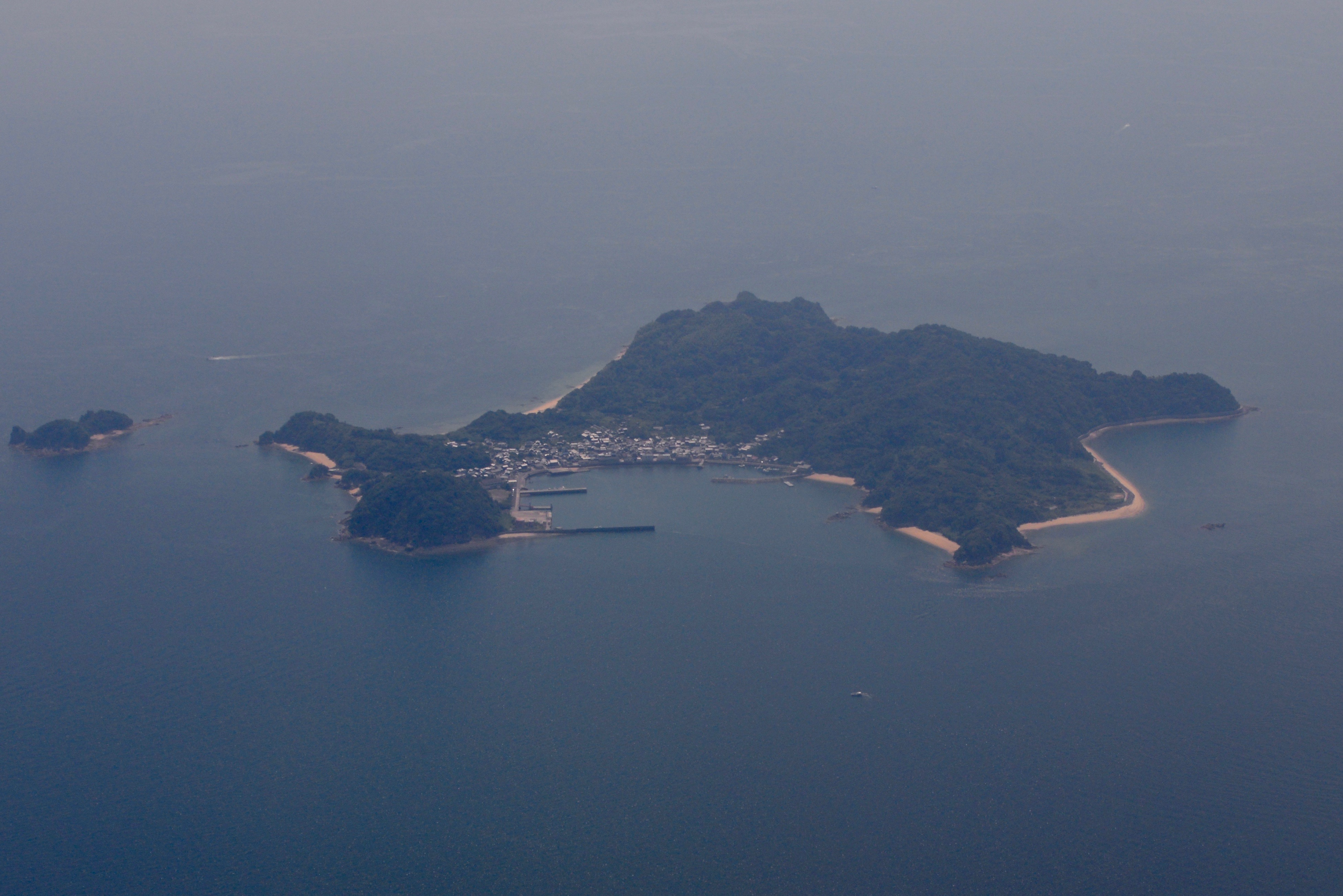 愛媛県松山市野忽那島